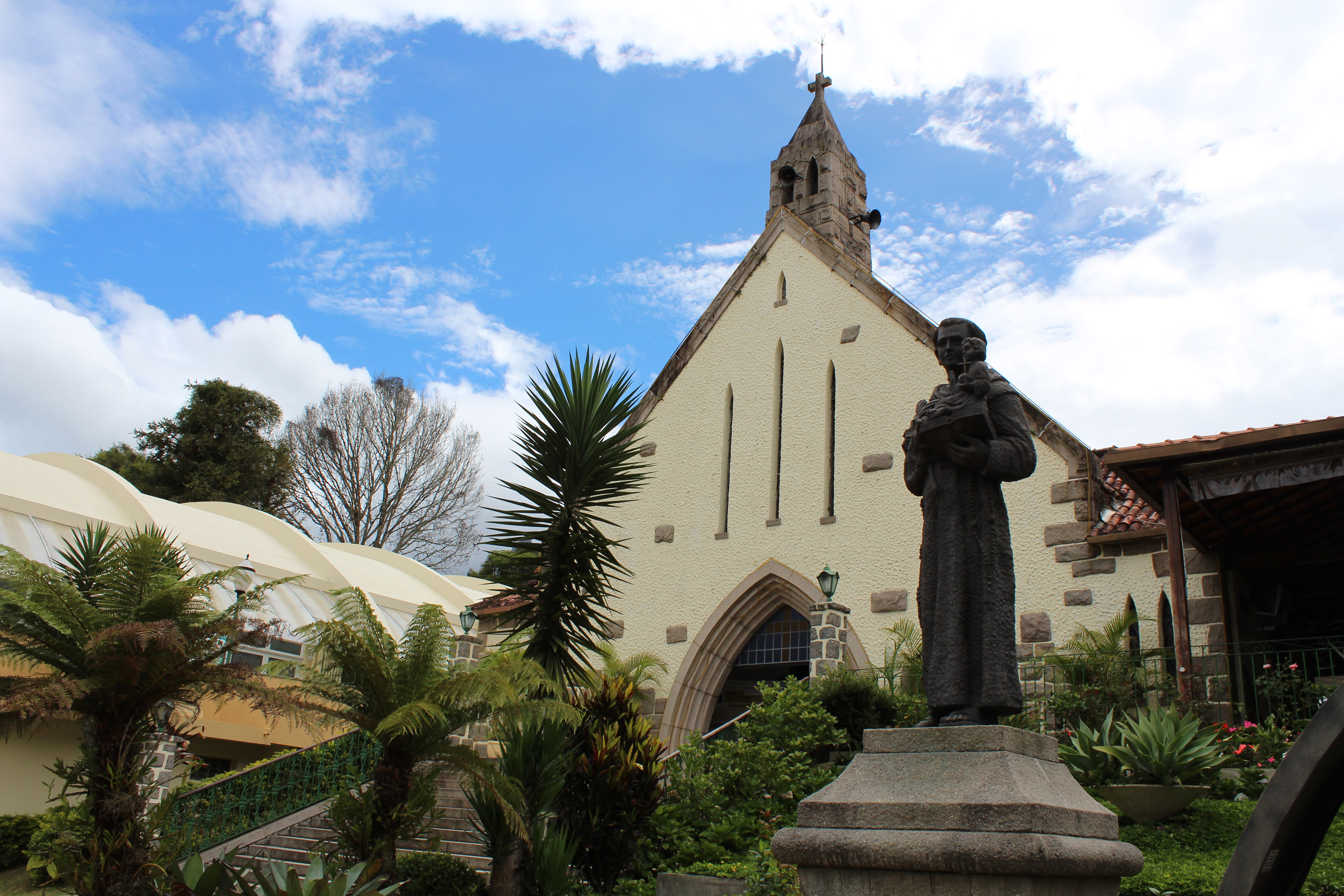 Igreja de Santo Antônio, localizada no bairro do Alto, em Teresópolis, Interior do Rio de Janeiro.